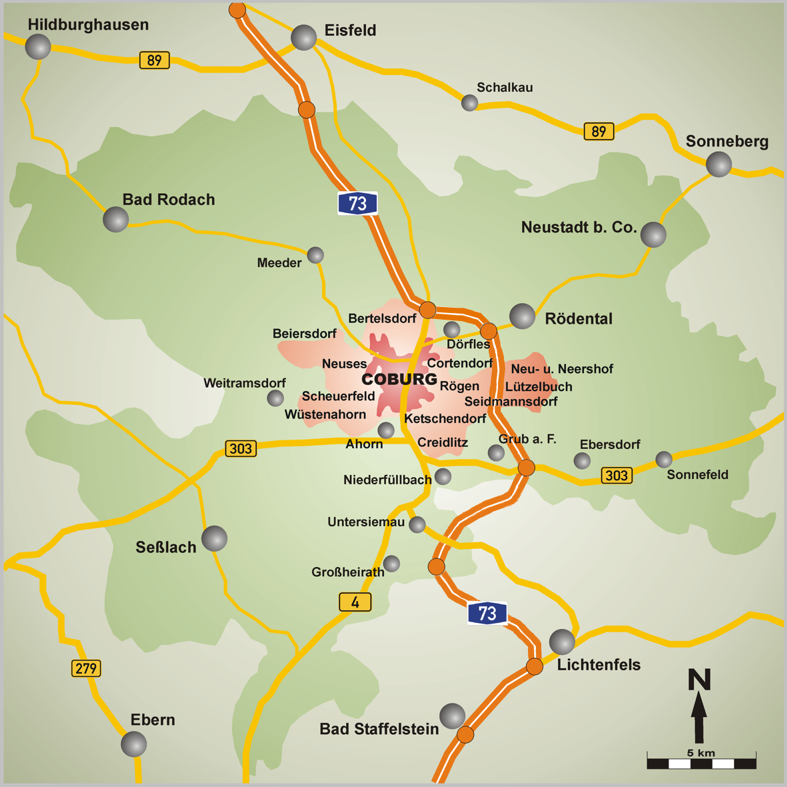 Coburg: Kernstadt und Stadtteile, Landkreis Quelle: selbst erstellt Fotograf/Zeichner: presse03 Datum: 16.06.2006